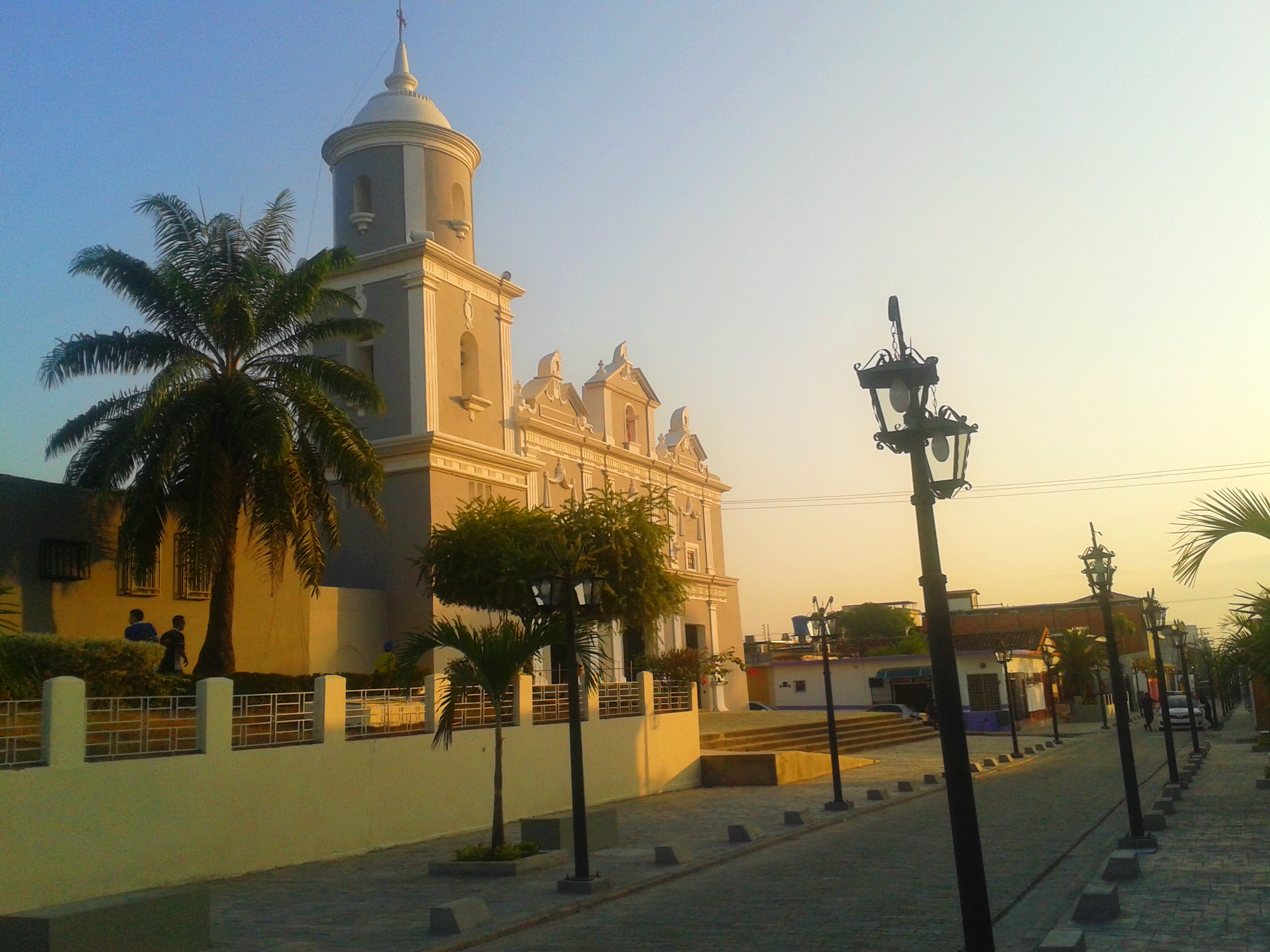 Iglesia San Juan Bautista, San Carlos